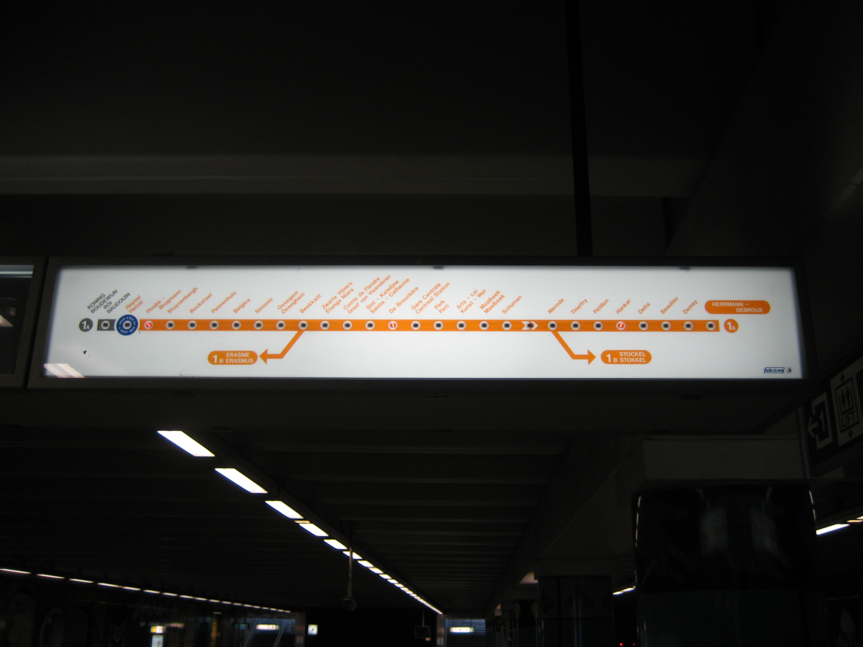 Treinaanwijzer in het Brusselse metrostation Heizel van voor de hervorming van 4 april 2009. De lampjes geven aan waar de treinen zich op de lijn bevinden en daarmee hoe lang het duurt voor de volgende trein het station bereikt.